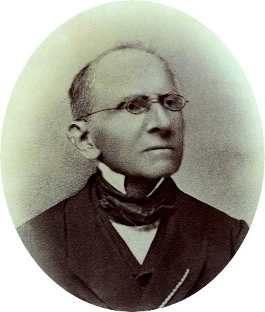 Antonín Haberler (1796-1873), první svobodně zvolený starosta nově vzniklé brněnské obce